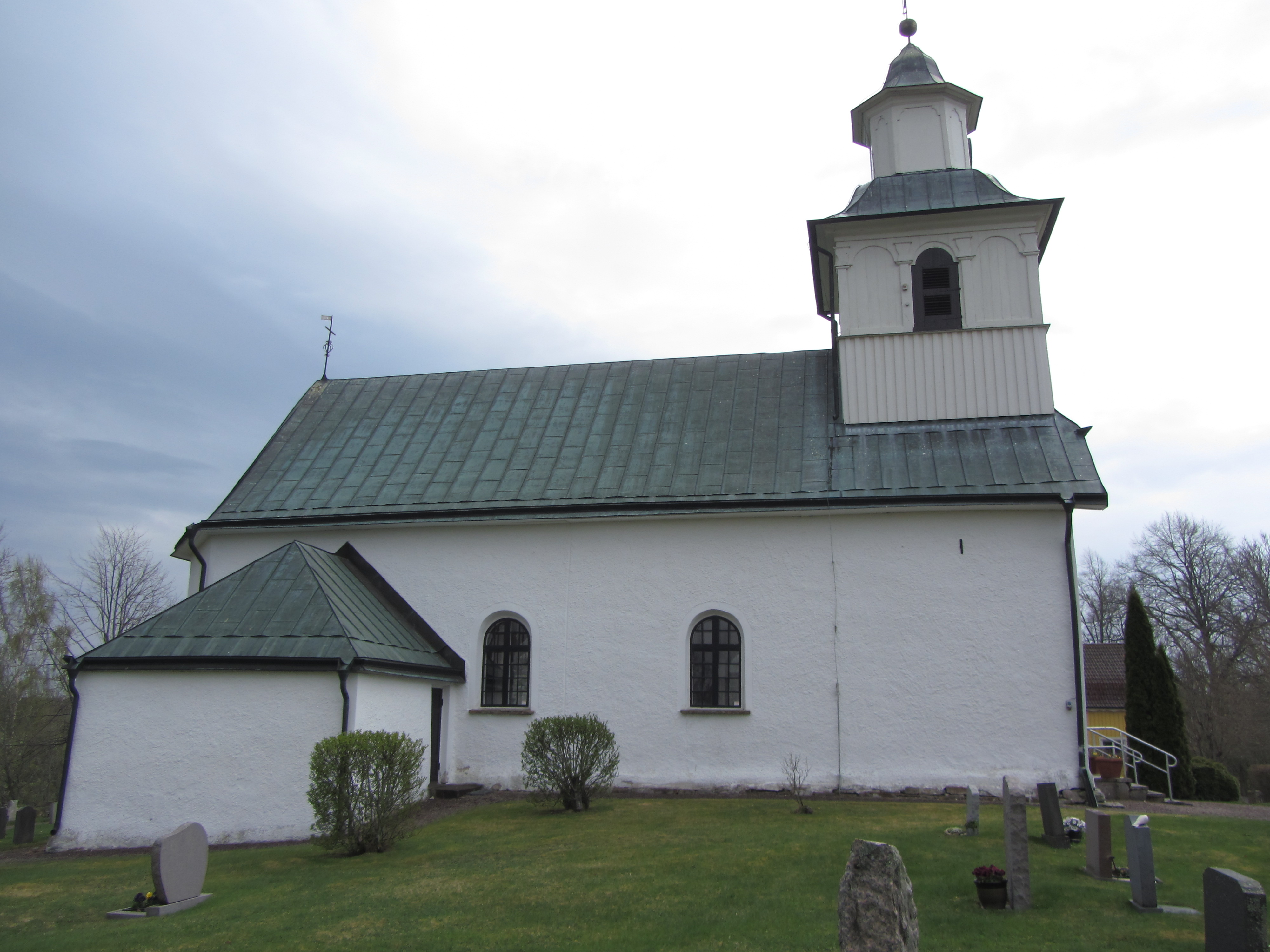 Bilder av Låstads kyrka i sydligaste Mariestads kommun i Västergötland.